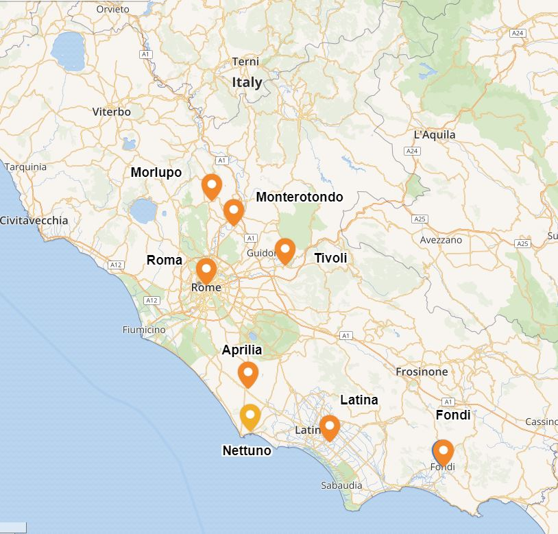 Regione Lazio 'ndrangheta 2017